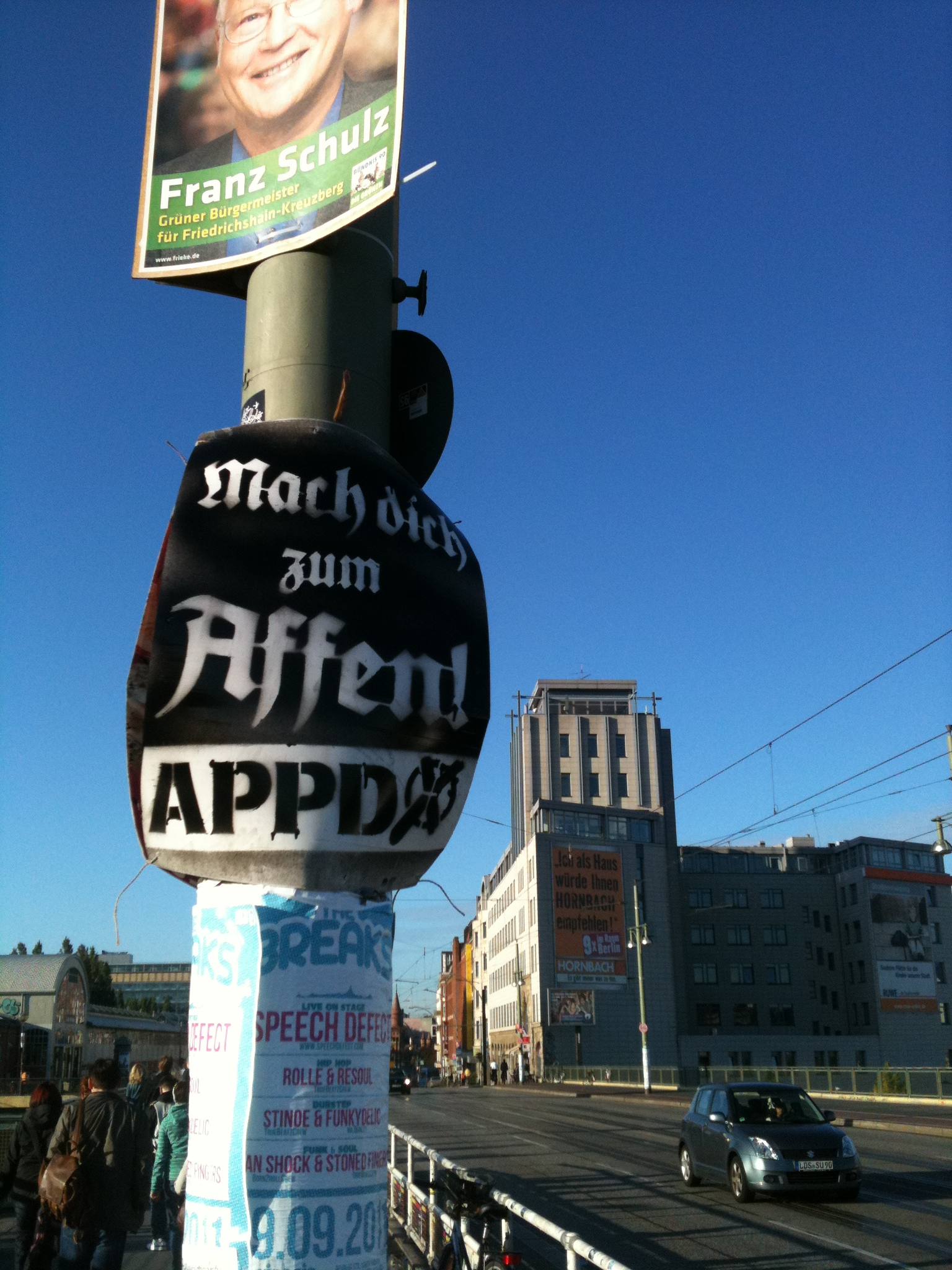 Wahlkampfplakat der APPD in Berlin